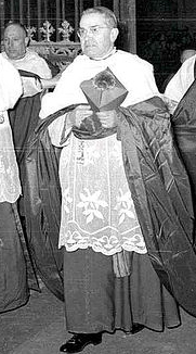 Benjamín de Arriba y Castro, arzobispo de Tarragona (1949-1970) →This file has been extracted from another file: Benjamín de Arriba y Castro.jpg